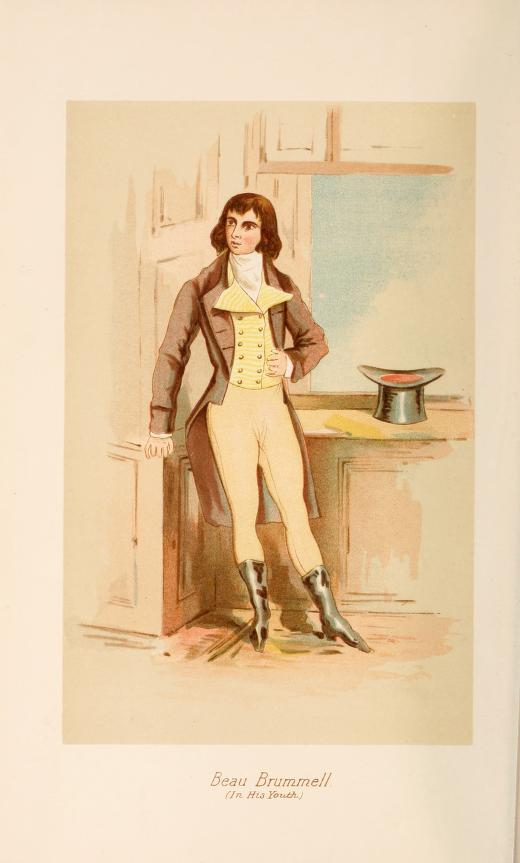 Illustration de Beau Brummell issue de "The life of George Brummell, esq., commonly called Beau Brummell" par Captain Jesse